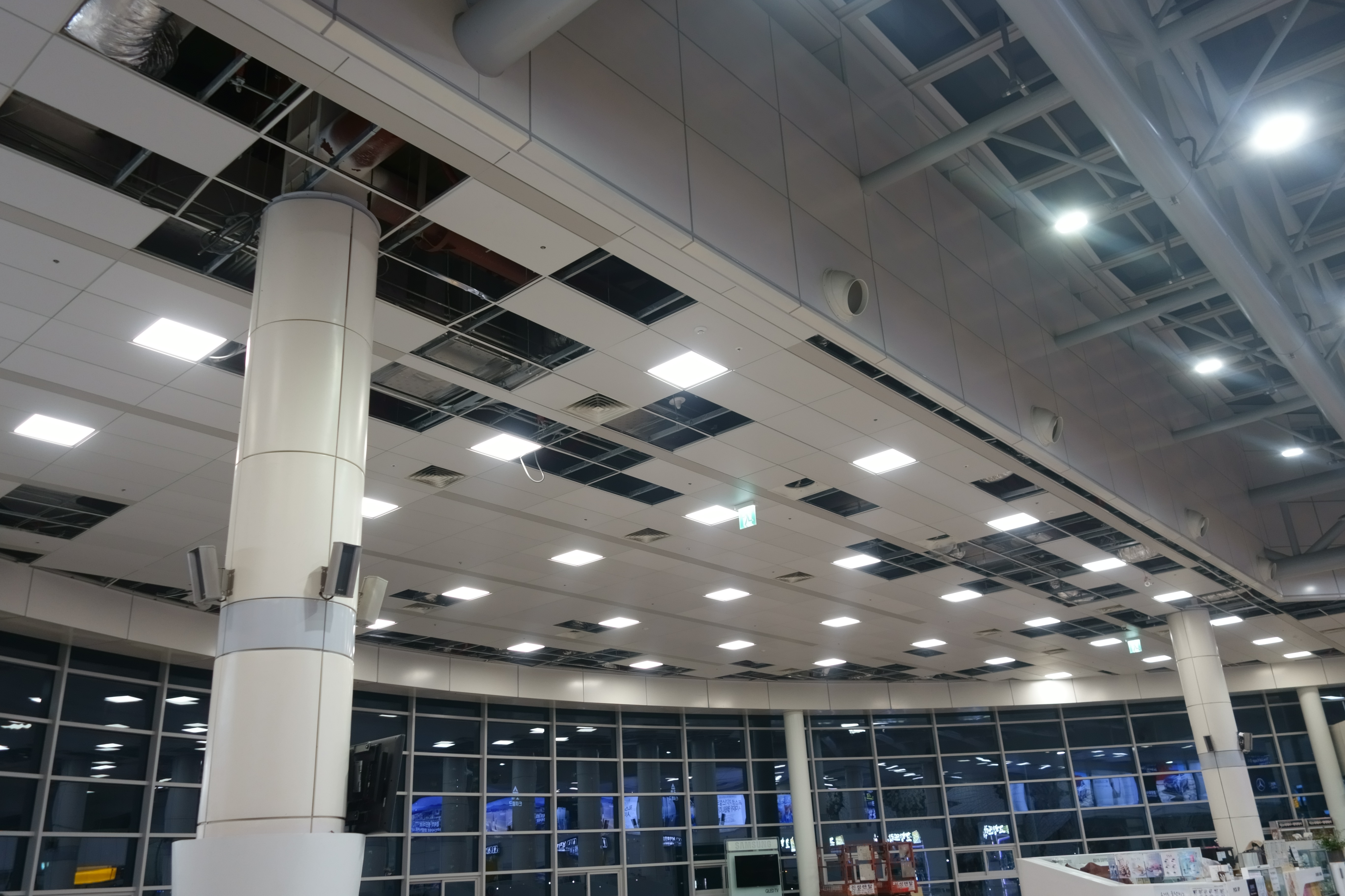 지진으로 파손된 포항역 천장